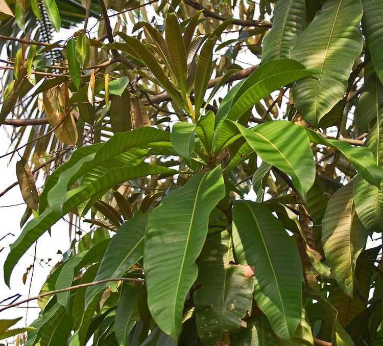 Mangifera kemanga leaves. Bogor, West Java, Indonesia